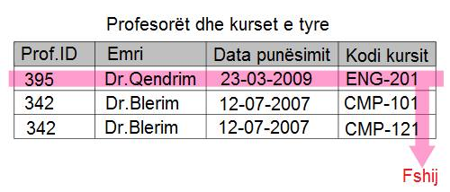 Fshirja e rekordeve